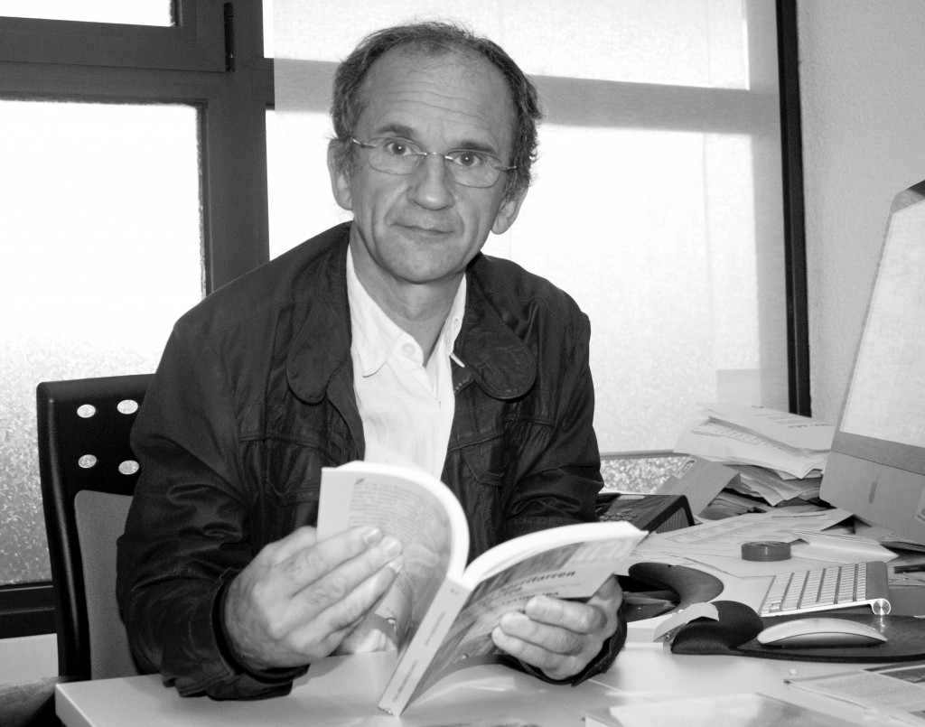 Joseba Agirreazkuenaga historialaria (ZuZeu, 2012)